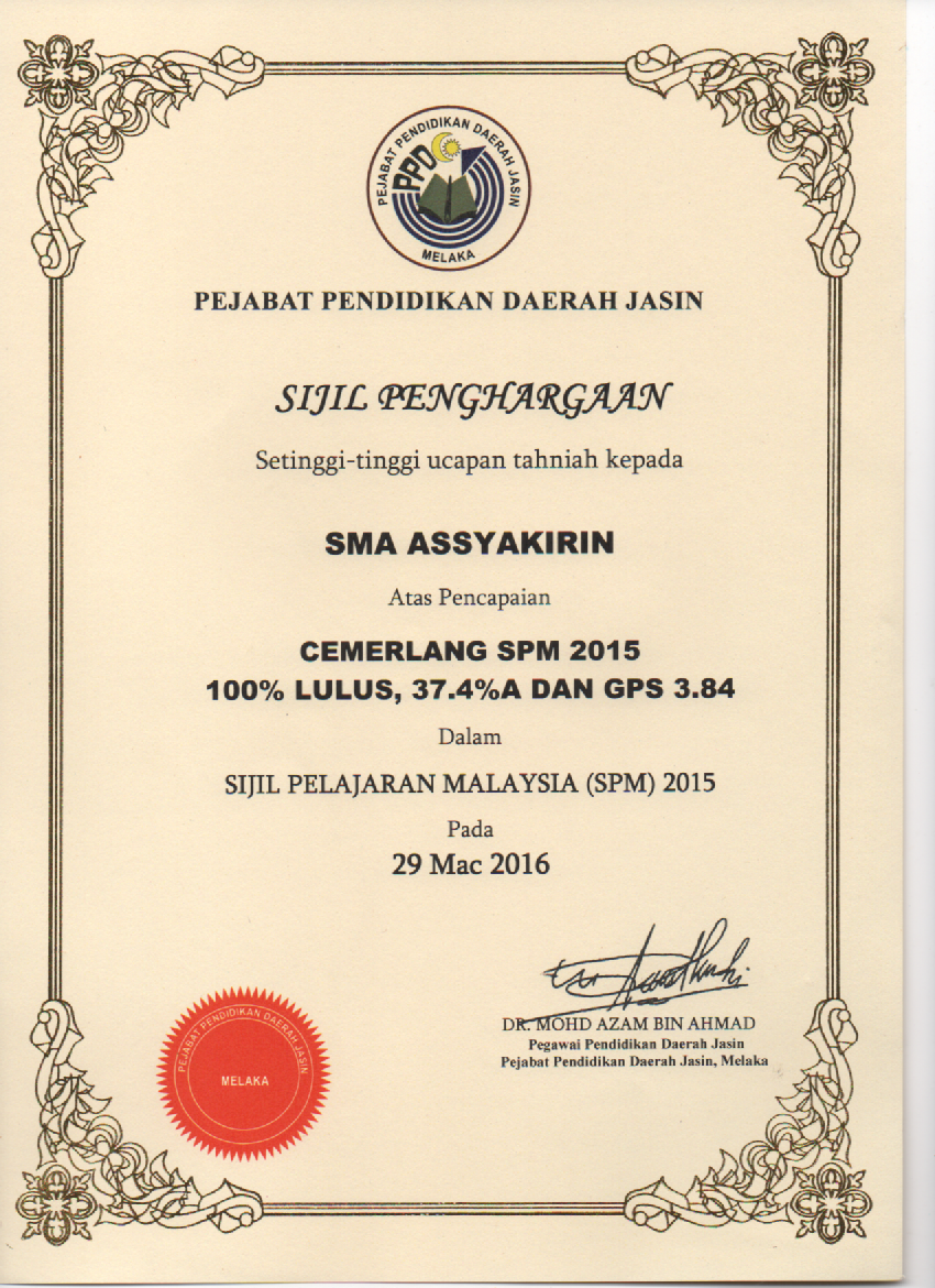 Sijil Penghargaan Cemerlang SPM 2015